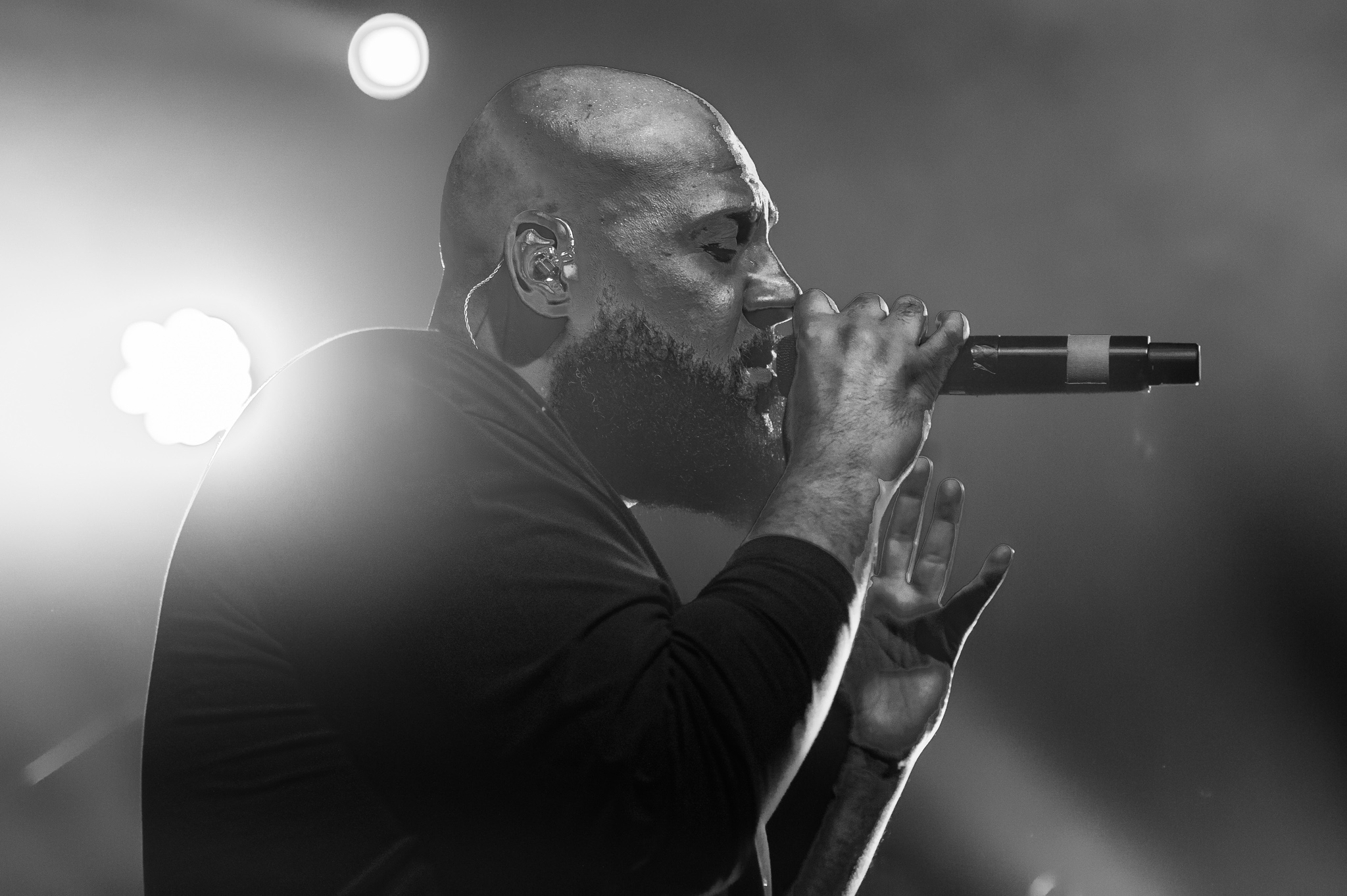 Concertbüro Franken,Der Hirsch,Konzert,Livekonzert,Livemusik,Moses Peter Pelham,Musik